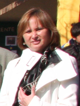 Con la presencia de los diputados de la Región de O'Higgins, José Ramón Barros y Juan Carlos Latorre, además de la alcaldesa de la comuna de Chépica, Rebeca Cofré, se realizó este viernes la ceremonia de entrega de más de 800 libros donados por la Biblioteca del Congreso Nacional (BCN) al Colegio Básico de dicha comunidad.